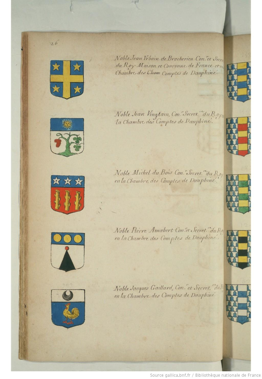 Blasons originaux de familles du Dauphiné : Jean Urbain de Brocherien, Jean Vingtain, Michel du Bois, Pierre Amabert, Jacques Gaillard (famille Olphe-Galliard).